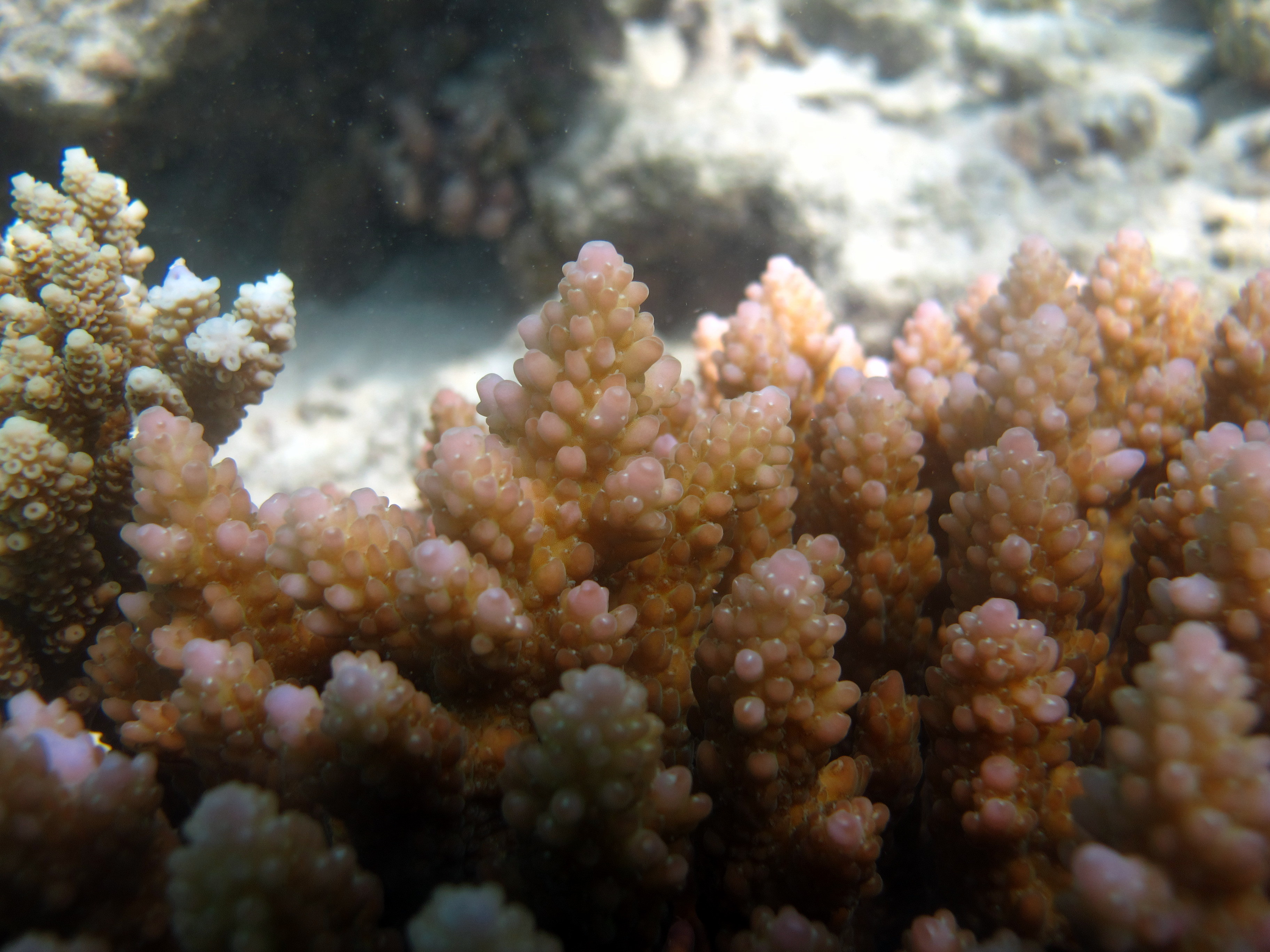 Gros plan sur du corail Acropora polystoma aux Maldives (atoll de Baa).